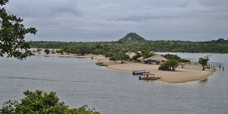 Praia.